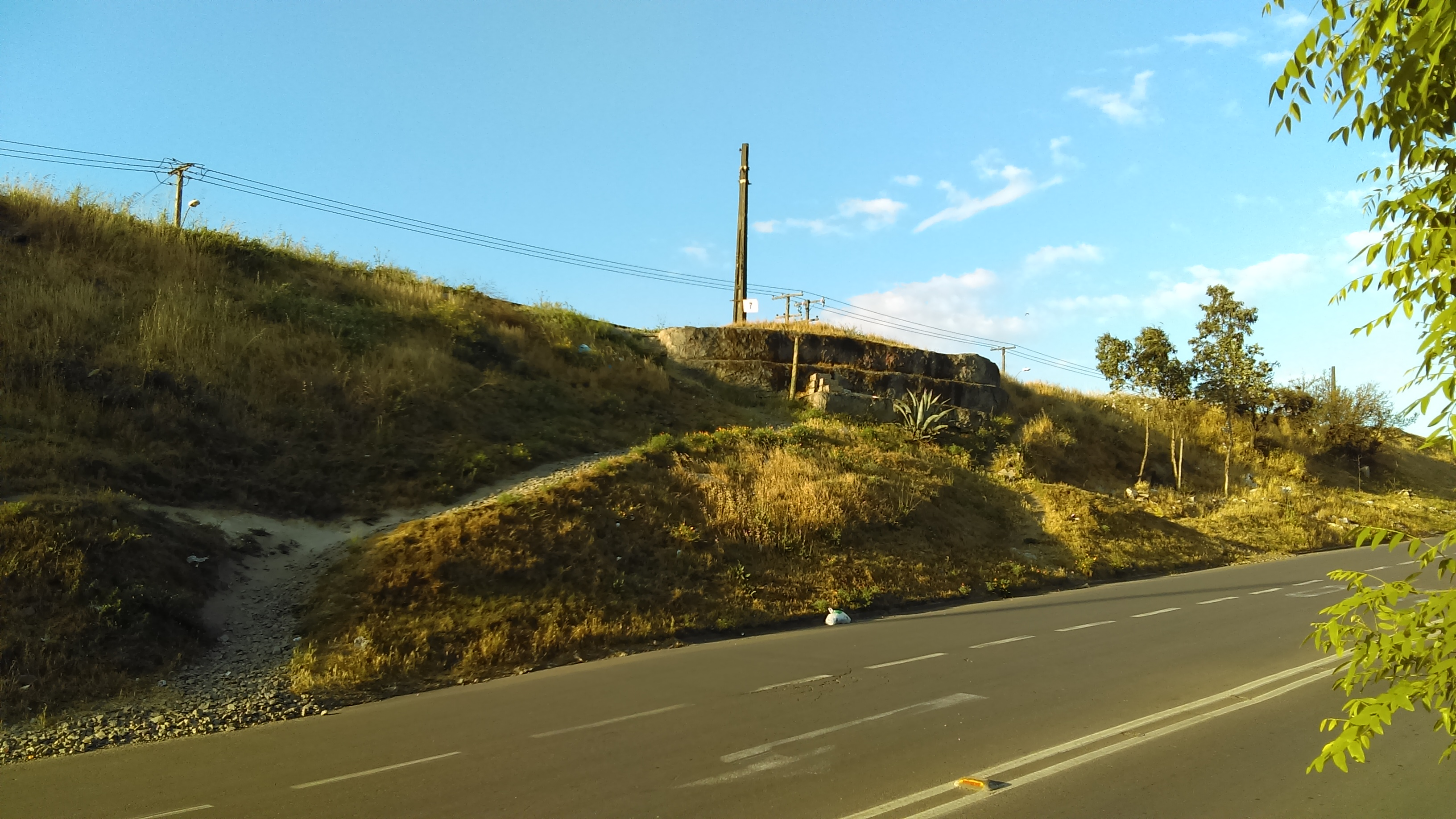 Imagen del Ramal Santiago - Cartagena, en su paso por la comuna de Cerrillos; la imagen fue tomada desde el puente Ferrocarril, de la avenida Lo Errázuriz.